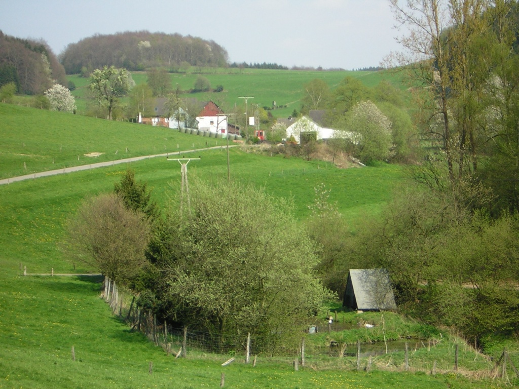 Berrenberg in Wipperfürth